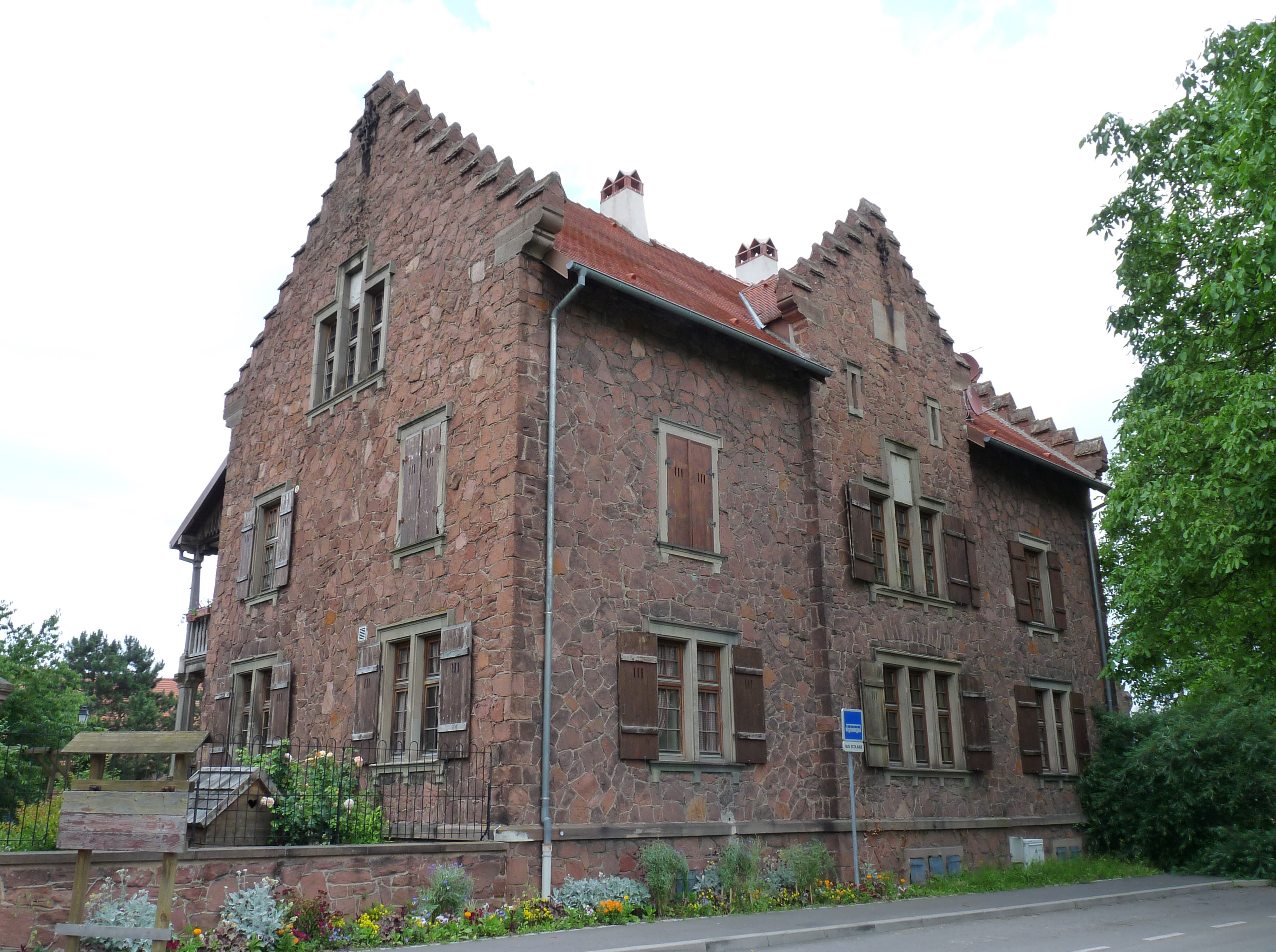 La Ferme Bussière à la lisière du parc de Pourtalès (Robertsau, Strasbourg). Alfred Renouard de Bussière la fit ériger en 1867. Architecte : Louis-Michel Boltz. Aujourd'hui Centre d'Initiation à l'Environnement